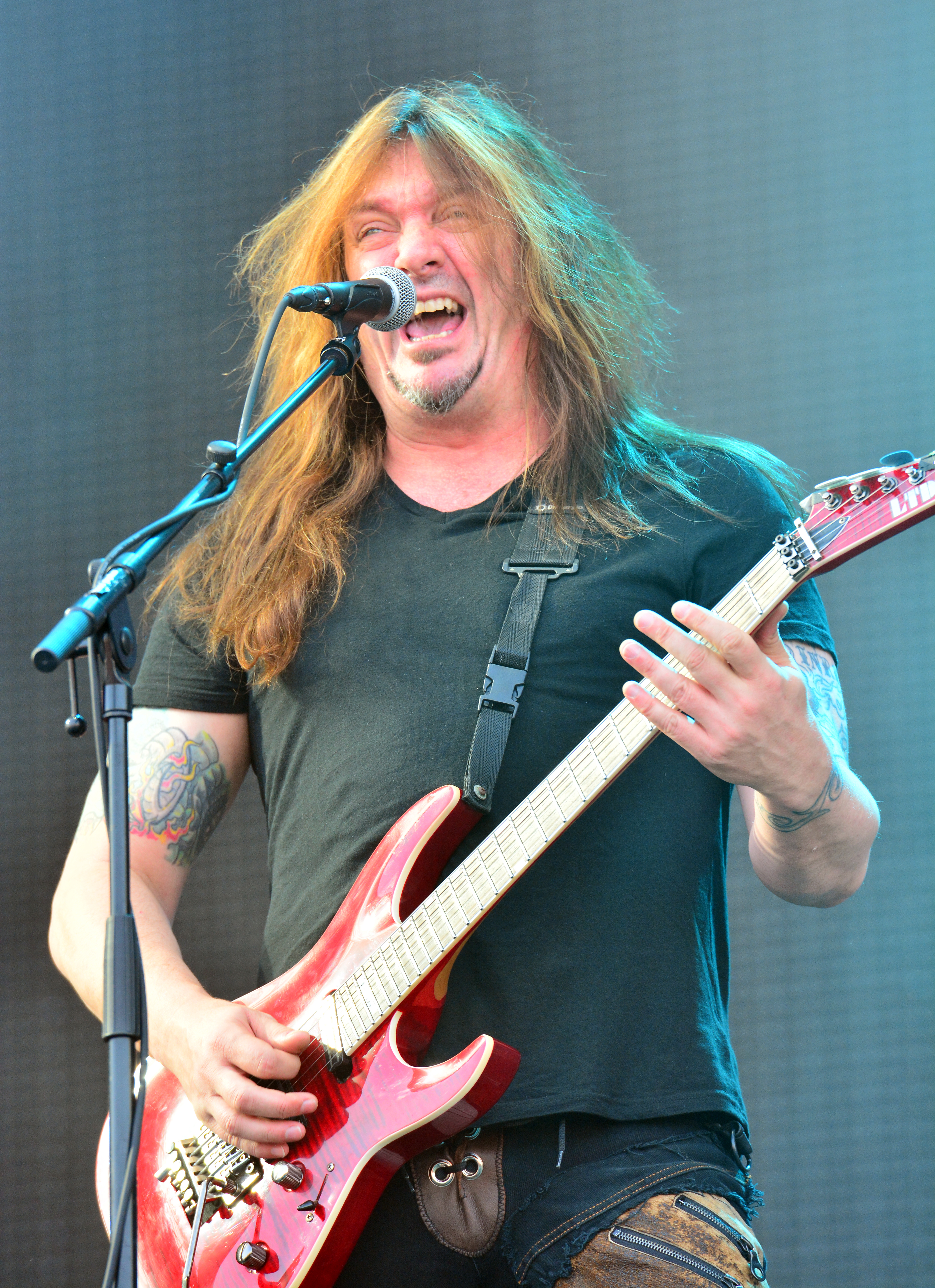 Dave Sabo von Skid Row beim Wacken Open Air 2014